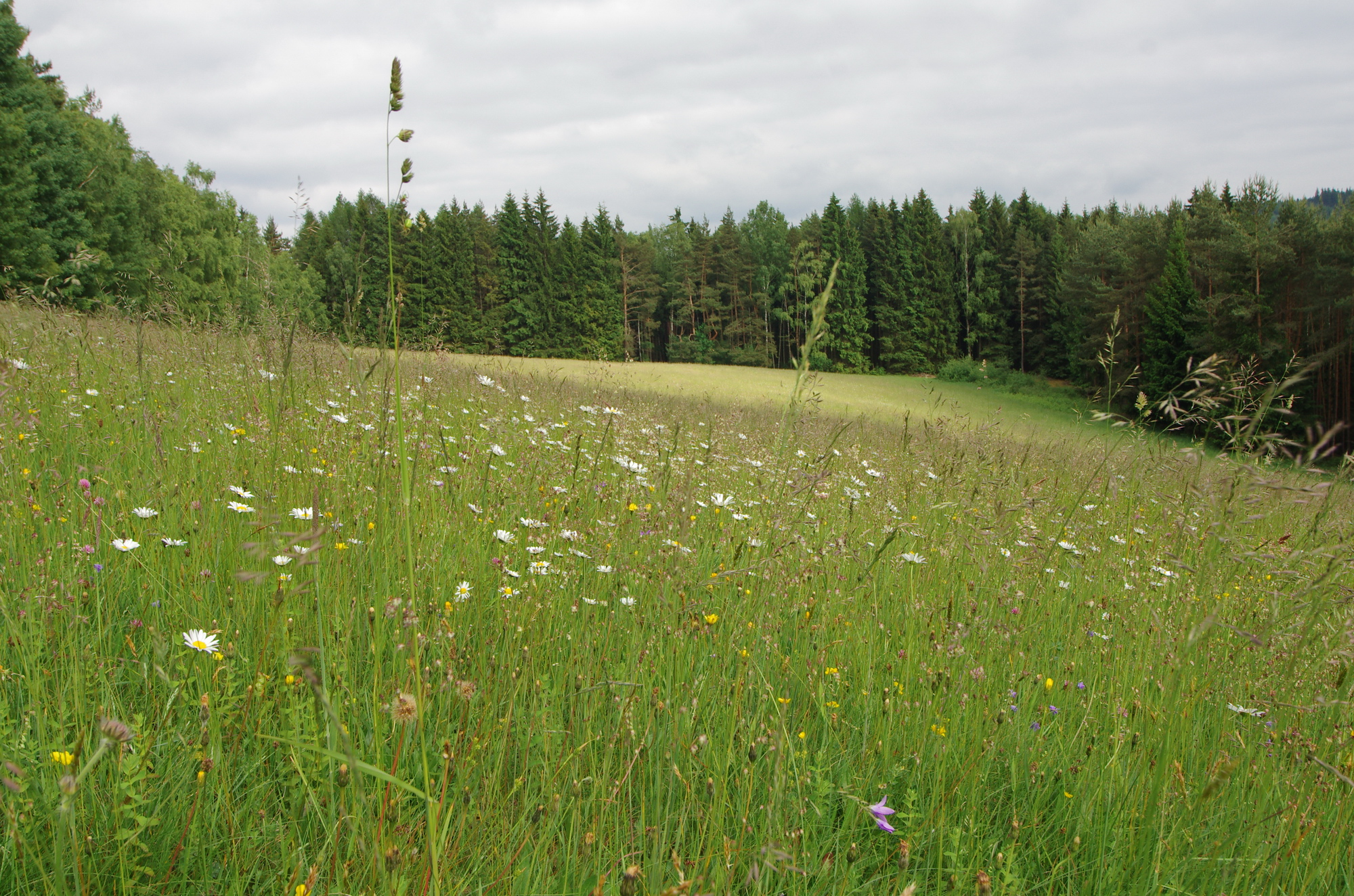 Přírodní rezervace Lipovka, okres Cheb